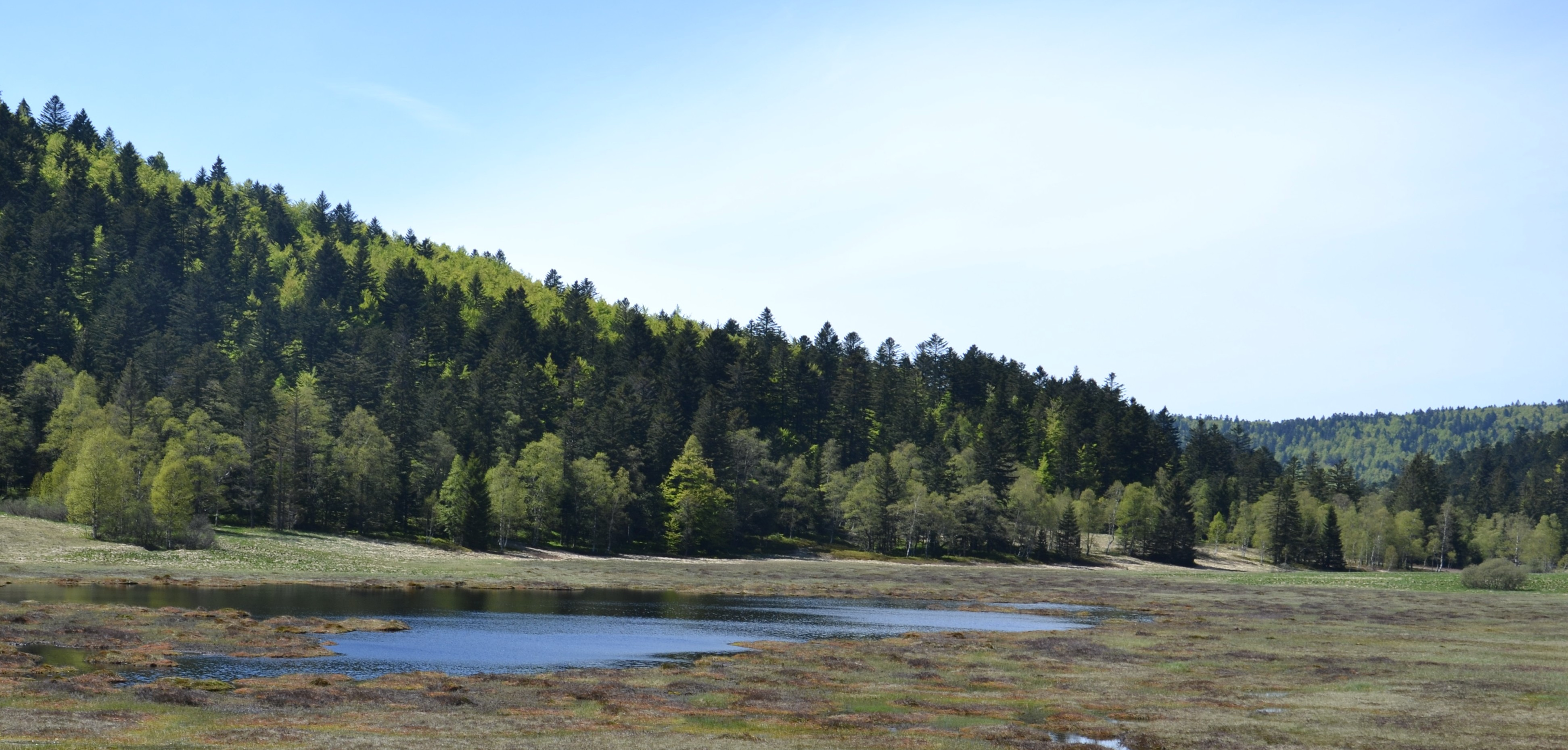 Etang de Machais en mai 2012, La Bresse, Vosges.